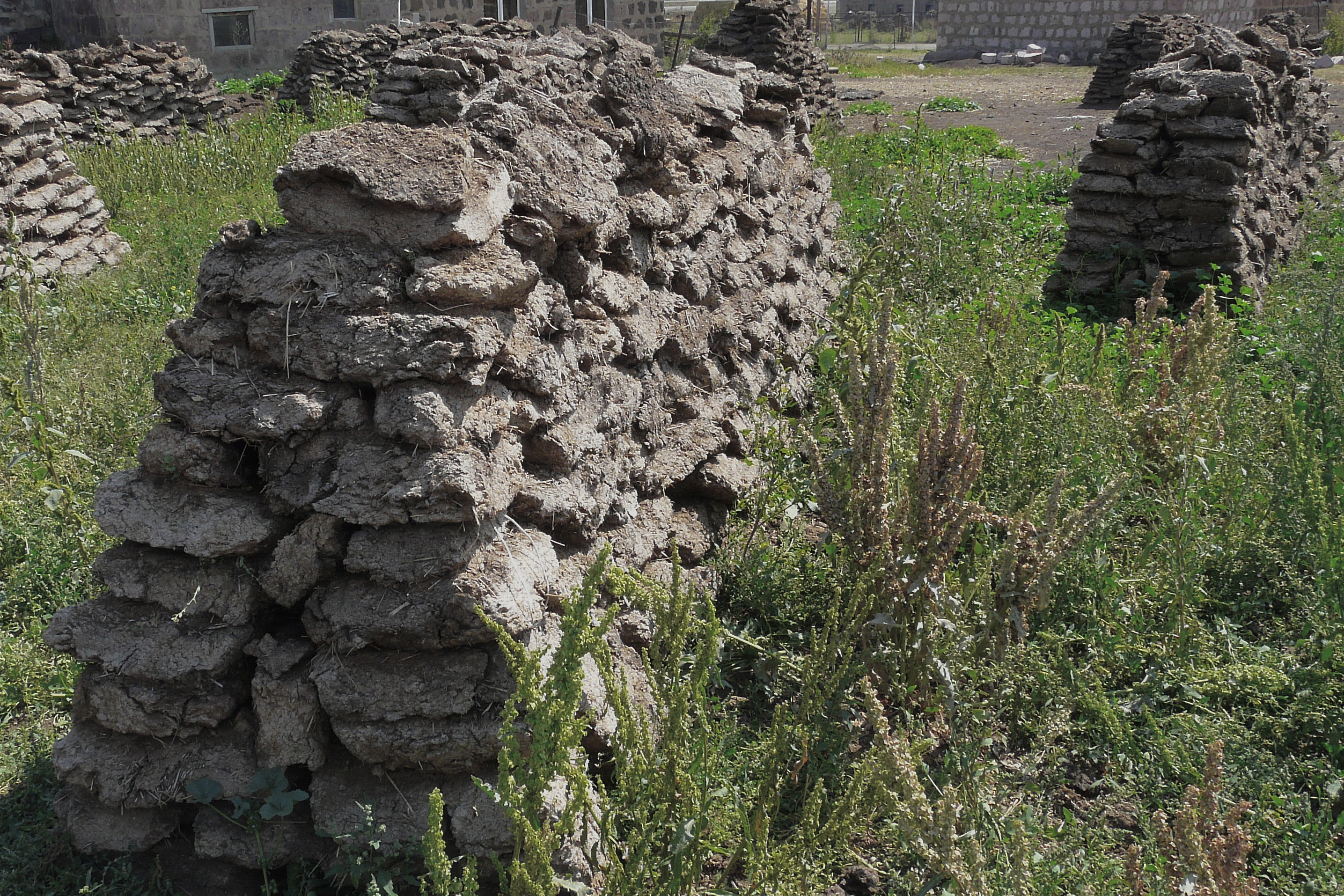 Wandeling door het dorpje Rya Taza. Dit is een stapel brandstof!